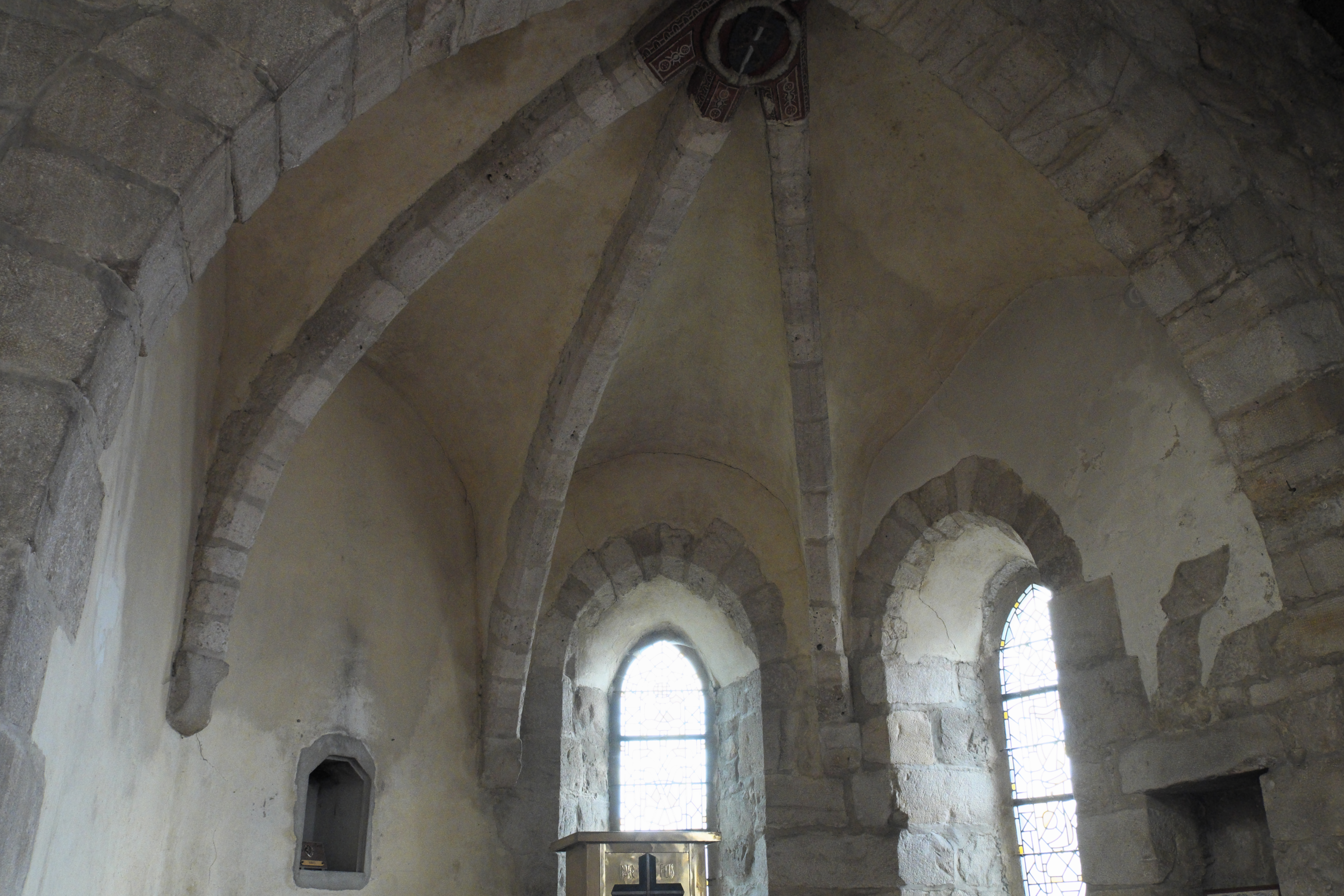 Katholische Kirche Saint-Pierre in Épernon im Département Eure-et-Loir (Centre-Val de Loire/Frankreich), Kreuzrippengewölbe der Seitenapsis .